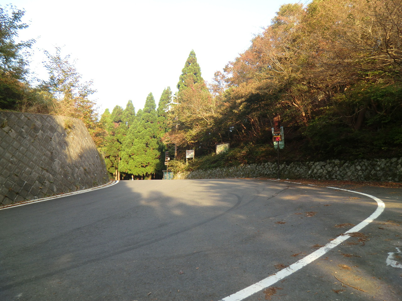 国道４７７号 花背峠